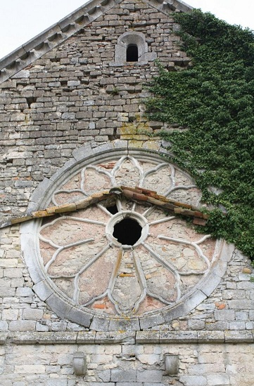 Façade de la chapelle de Libdeau avec sa rose de pierre surmontée d'une petite fenêtre de style roman.